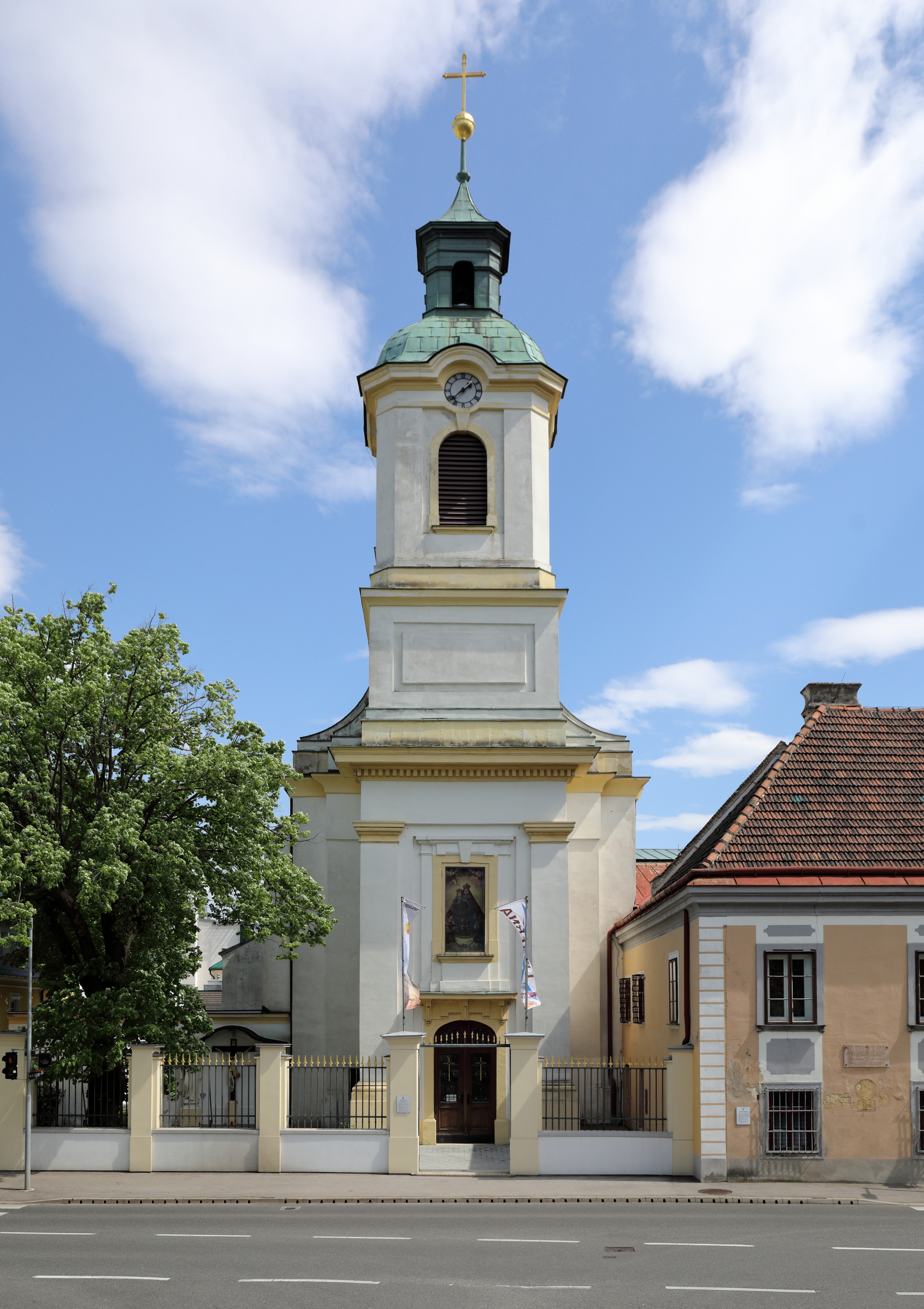 Westansicht der Franziskanerkloster-, Wallfahrts- und ehemalige Pfarrkirche hll. Maria Magdalena und Maria in der niederösterreichischen Marktgemeinde Maria Enzersdorf.1454 erfolgte die Gründung des Klosters. Klostergebäude und Kirche waren 1472 vollendet, bei beiden Türkenbelagerungen (1529, 1683) jeweils zerstört. Von 1727 bis 1729 erfolgte Wiedererrichtung und Erweiterung. Eine weitere Erweiterung fand unter Richard Jordan von 1907 bis 1909 statt. Nachdem die Kirche 1784 eine Pfarrkirche wurde (bis 2014), ersetzte man 1788 den Dachreiter durch einen 38 m hohen Kirchturm.